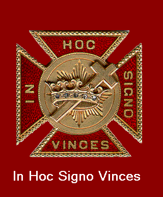 Tempelridderkors